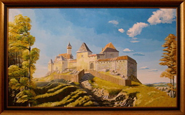 Hrad Orlík, olej na plátně 133x72 cm